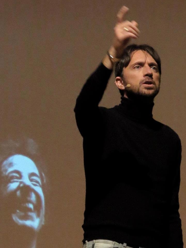 Andrea Scanzi in "Gaber se fosse Gaber" a Cison di Valmarino (Treviso).